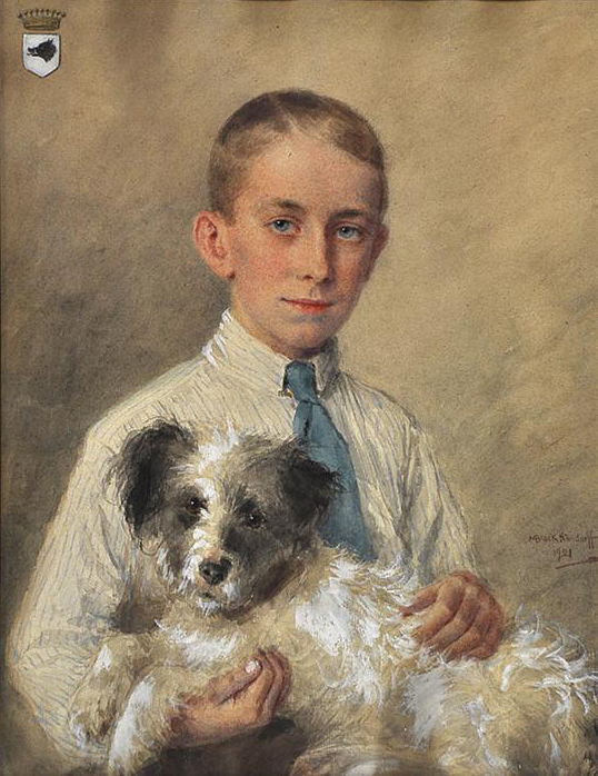 Jugendbildnis des Grafen Albrecht von Hardenberg mit Wappen und Hund